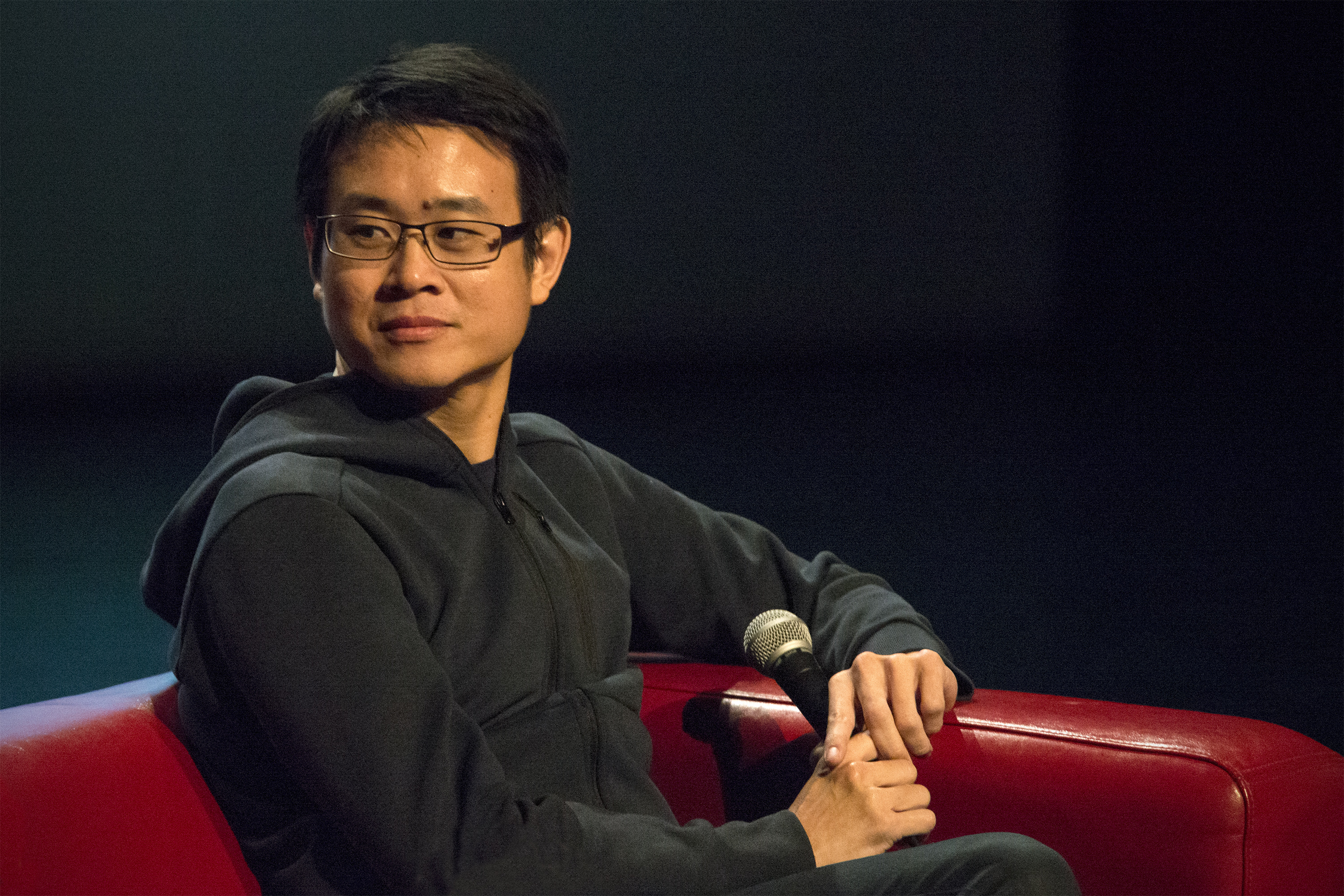 Rencontre Sonny Liew, studio du théâtre d'Angoulême, Festival d'Angoulême 2018.